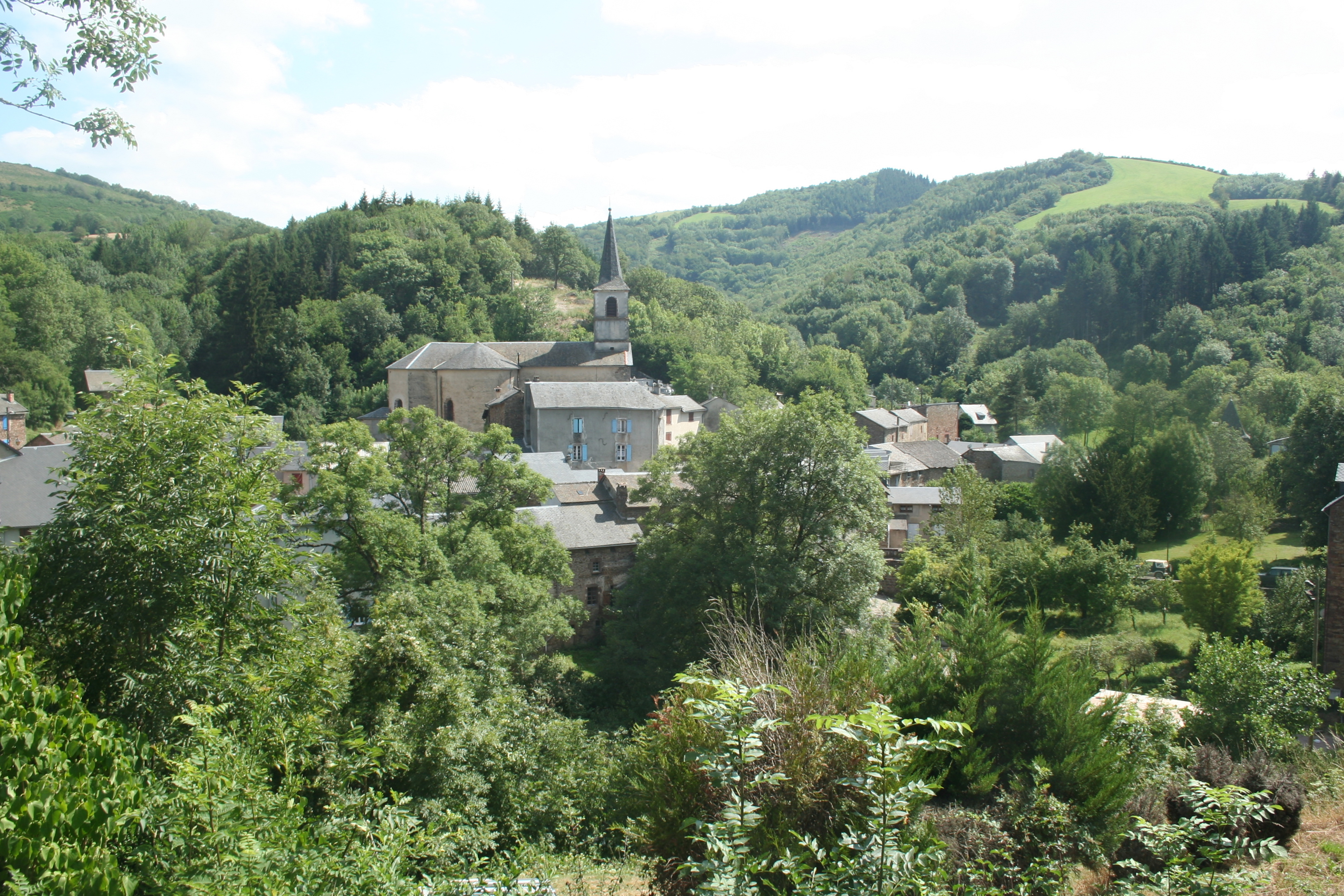 Mounes-Prohencoux (Aveyron) - vue générale de Mounes.